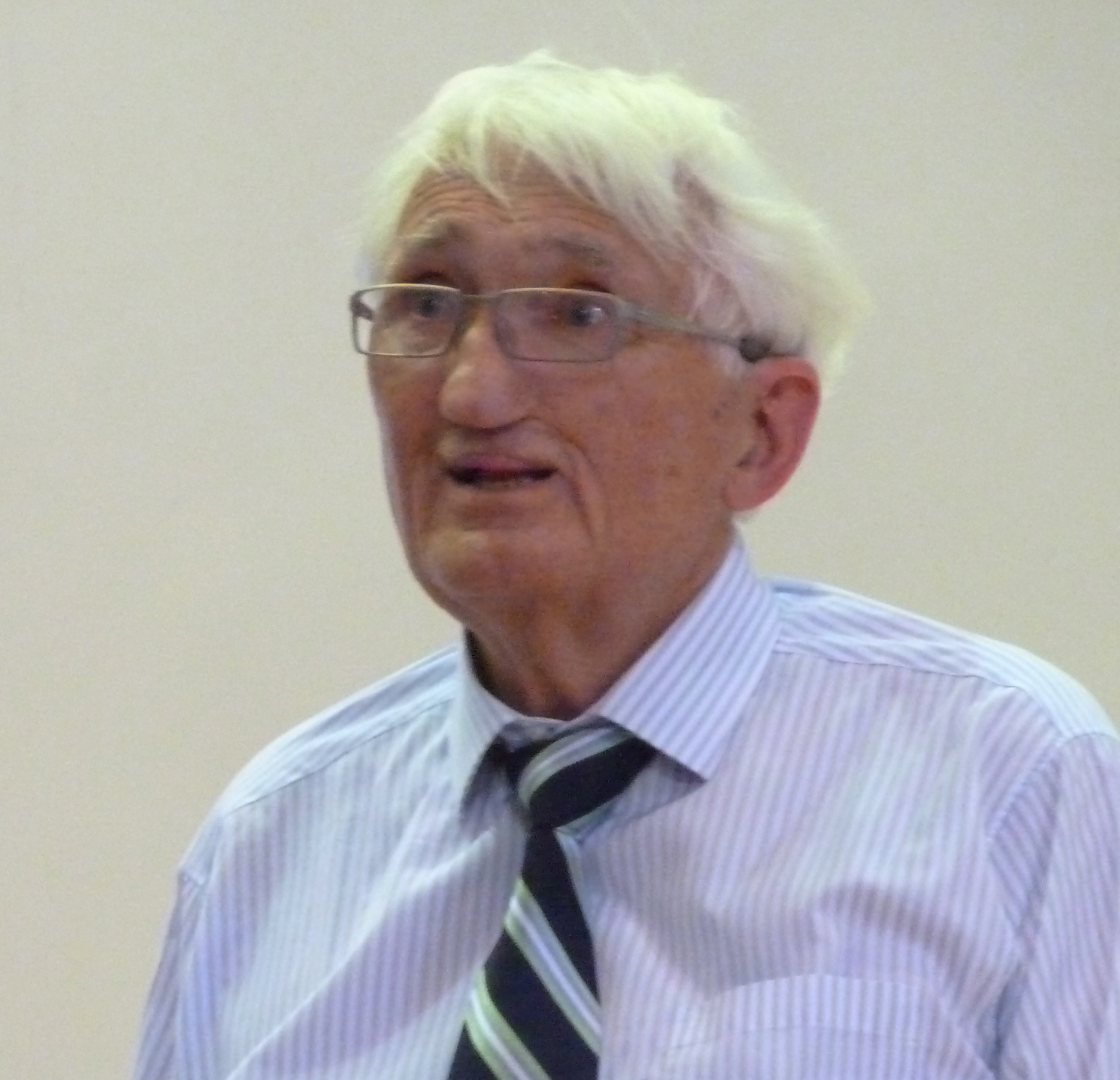 Jürgen Habermas spricht zur Krise der Europäischen Union Vortrag des Philosophen am 16. Juni im Audimax der Humboldt-Universität zu Berlin